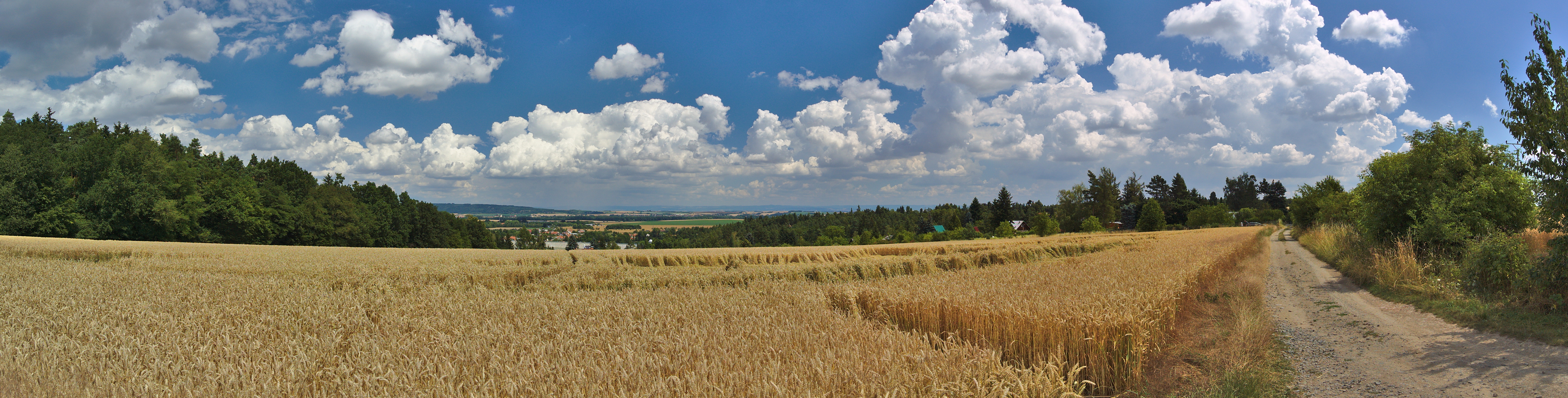 Výhled na Mostkovice od jihu, okres Prostějov